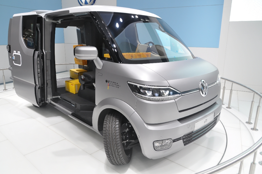 Hannover-Messe April 2012 Dieses Foto entstand durch die Mithilfe des gemeinnützigen Vereins Skillshare bei der Akkreditierung als Fotograf. Infos unter skillshare.eu Skillshare e.V. ist ein eingetragener gemeinnütziger Verein zur Förderung der Bildung durch Unterstützung der Erstellung, Sammlung und Verbreitung so genannten freien Wissens. IBAN: DE16 8306 5408 0004 8850 66 BIC: GENODEF1SLR Bank: VR-Bank Altenburger Land